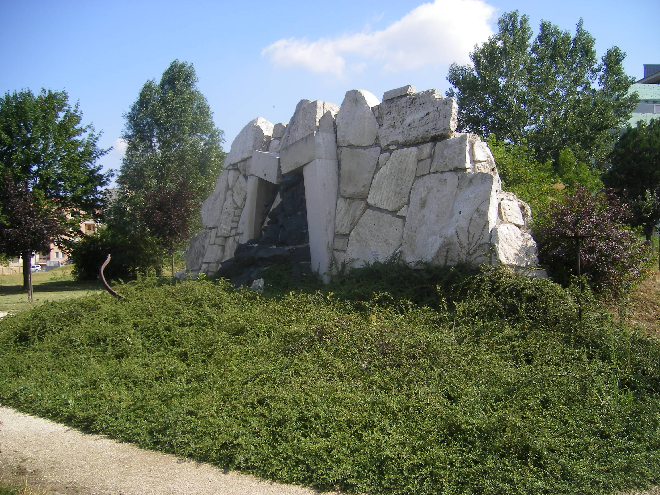 Tatabánya - a bányászemlékmű